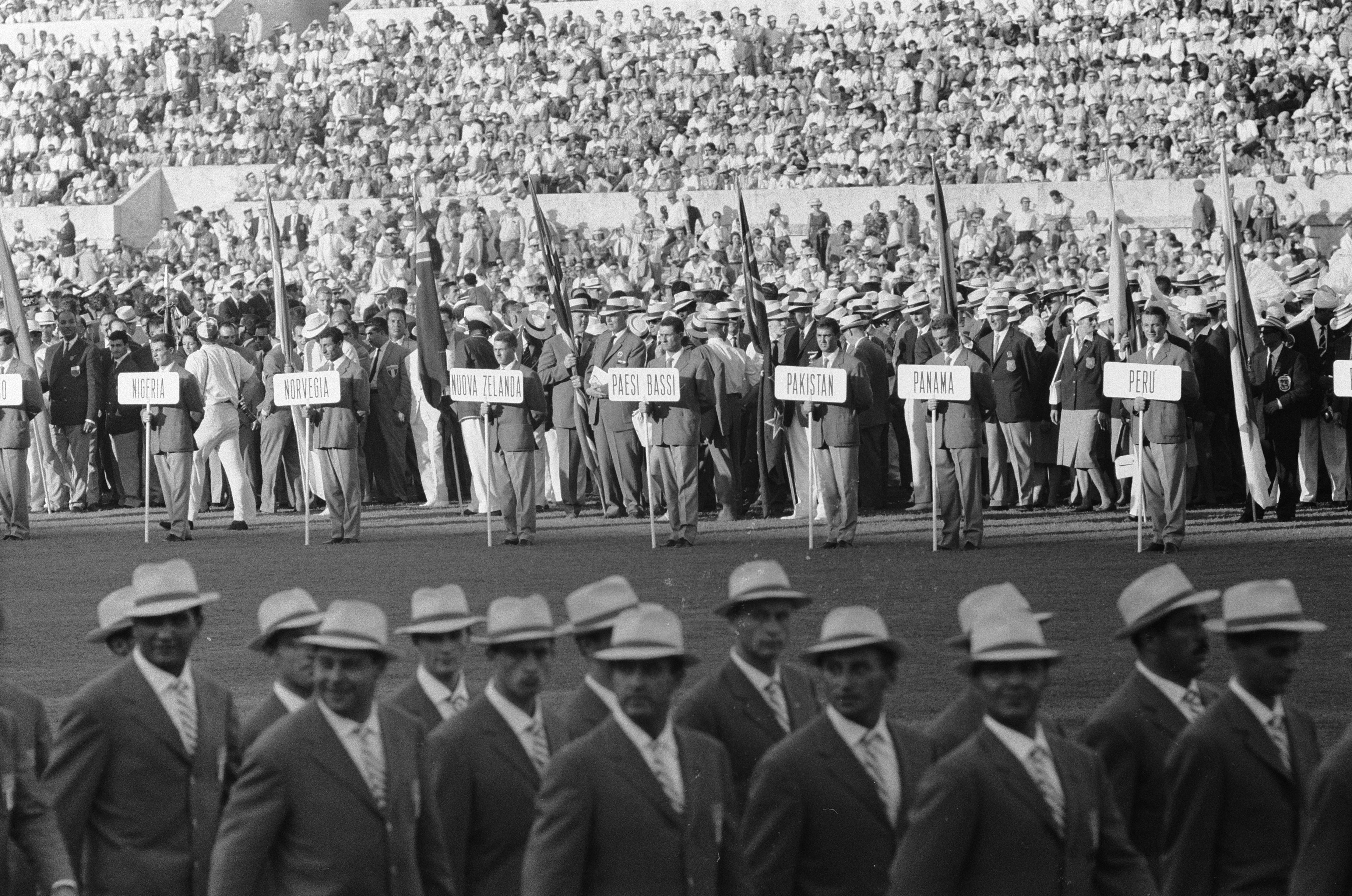 Collectie / Archief : Fotocollectie Anefo Reportage / Serie : [ onbekend ] Beschrijving : Olympische Spelen te Rome. Opening. Opgestelde landen, waaronder Nederland (Paesi Bassi) Datum : 25 augustus 1960 Locatie : Rome Trefwoorden : atleten, openingen Fotograaf : Pot, Harry / Anefo Auteursrechthebbende : Nationaal Archief Materiaalsoort : Negatief (zwart/wit) Nummer archiefinventaris : bekijk toegang 2.24.01.05 Bestanddeelnummer : 911-5407